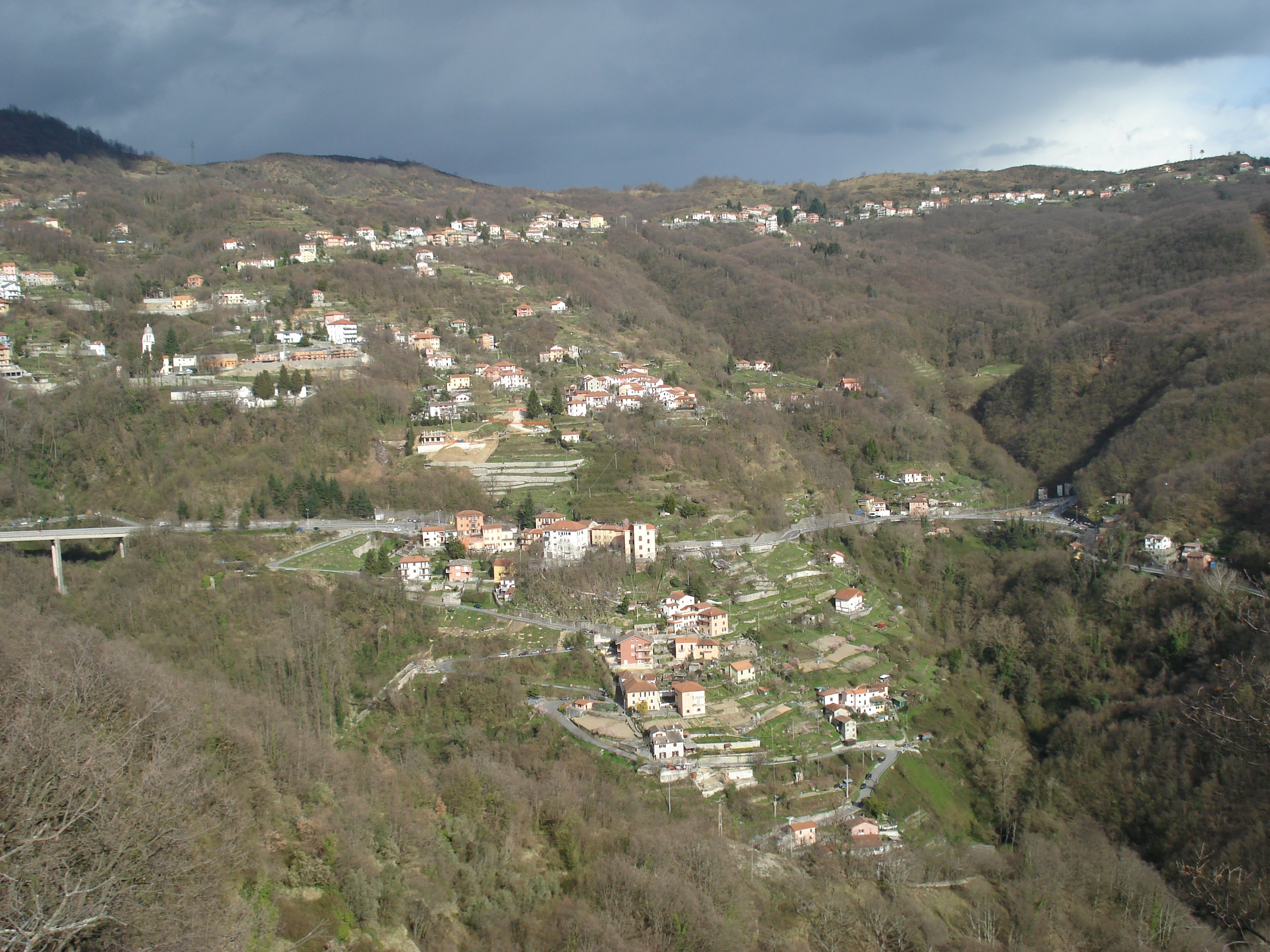 Bargagli view